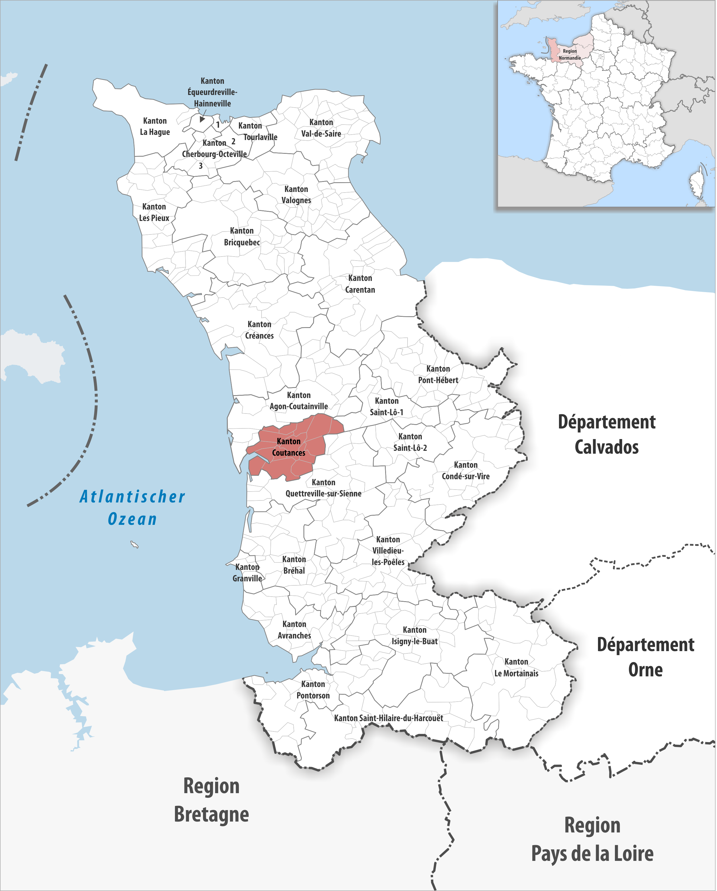 Lage des Kantons Coutances